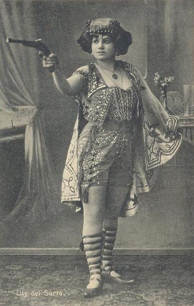 Elly del Sarto; from a c. 1910 postcard.